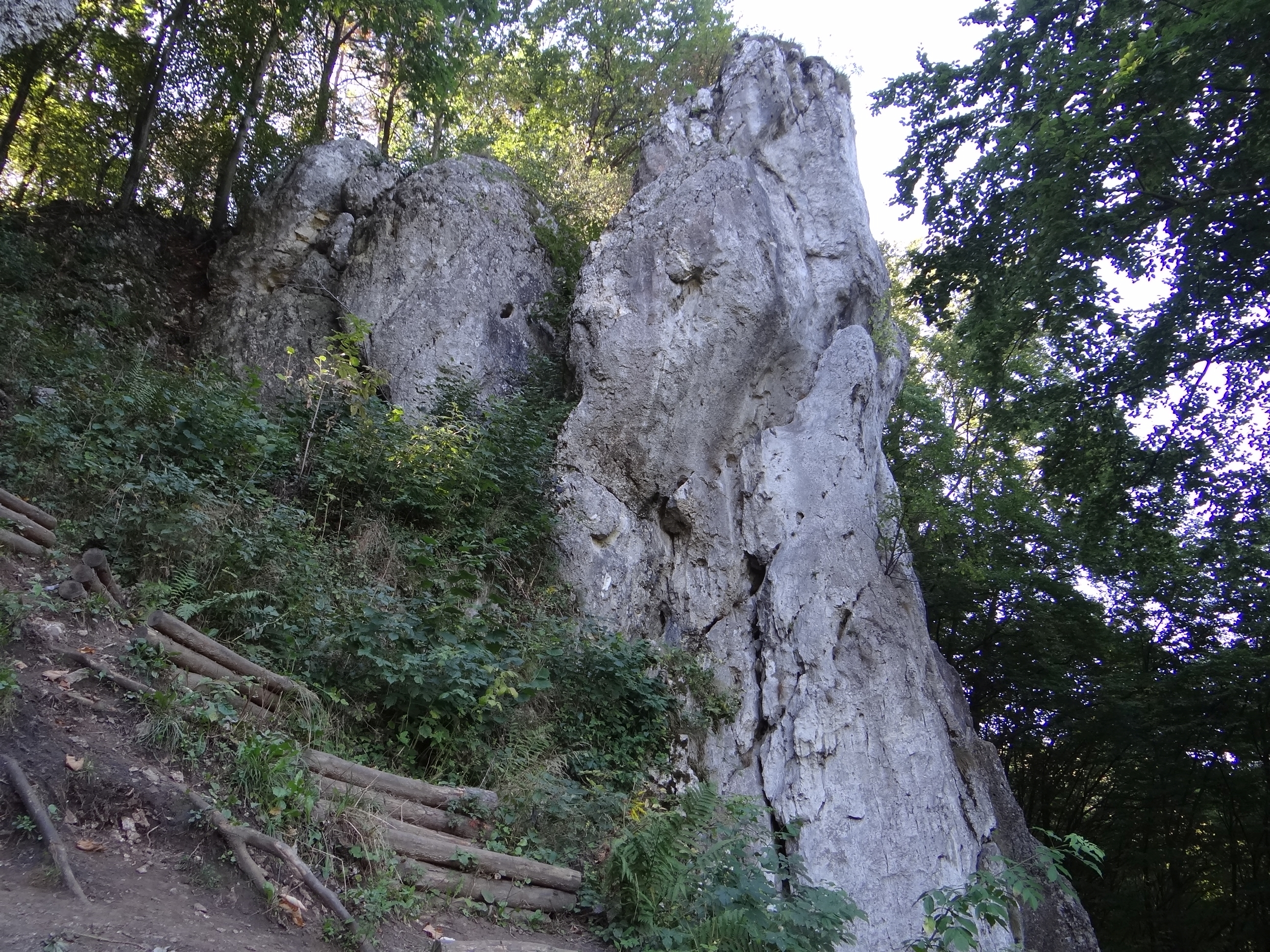 Łabajowa w Dolinie Będkowskiej